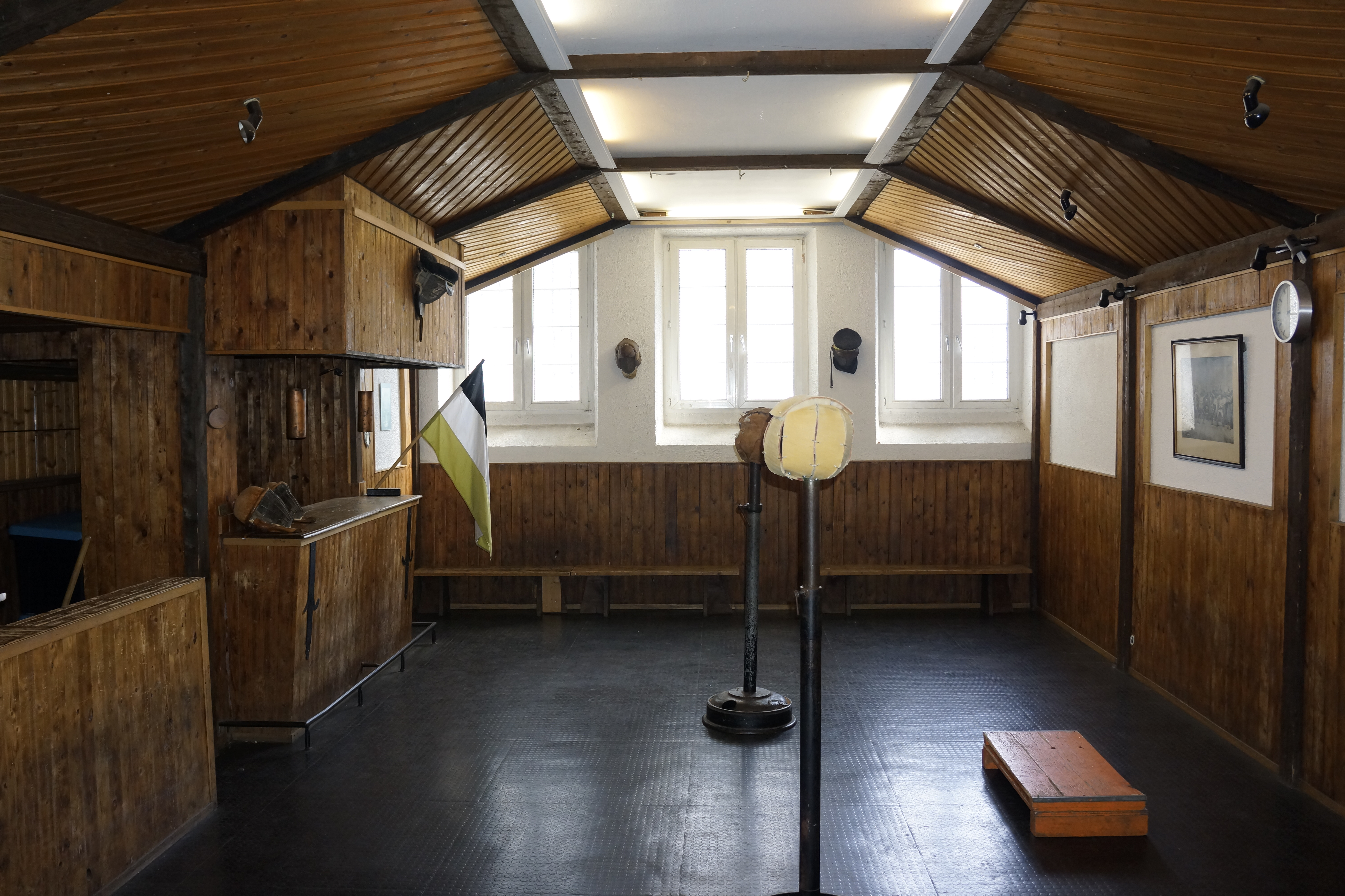 Der ausgebaute und gut ausgestattete Paukboden des Corps Franconia Darmstadt